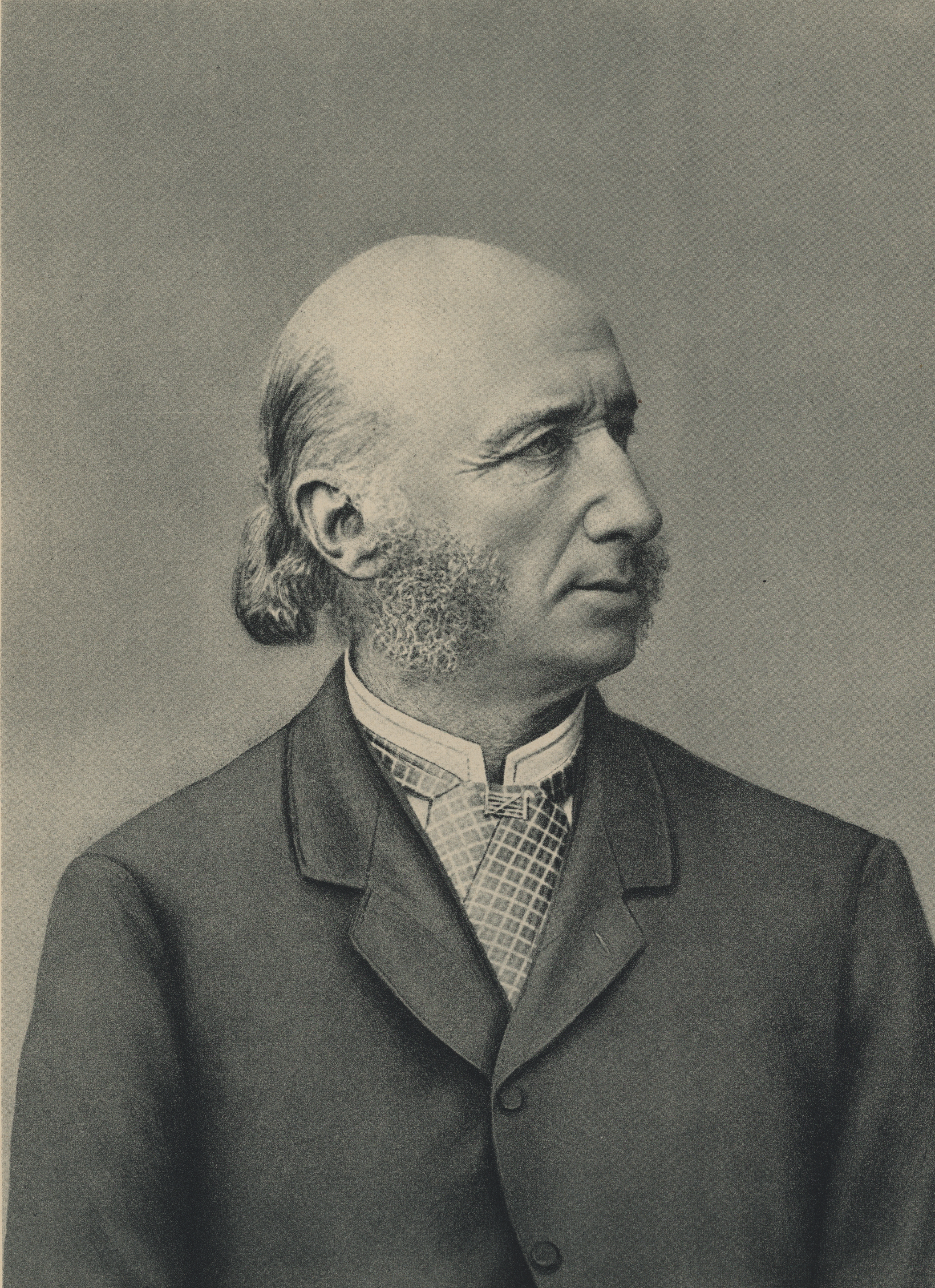 Format: Litografi Utgivelsesår / Published: 1914 (Vore Høvdinger 46). Utgiver / Publisher: F. Bruns Bokhandels Forlag, Trondhjem. Eier / Owner Institution: Trondheim byarkiv, The Municipal Archives of Trondheim Arkivreferanse / Archive reference: Ila skole, Va - F9414